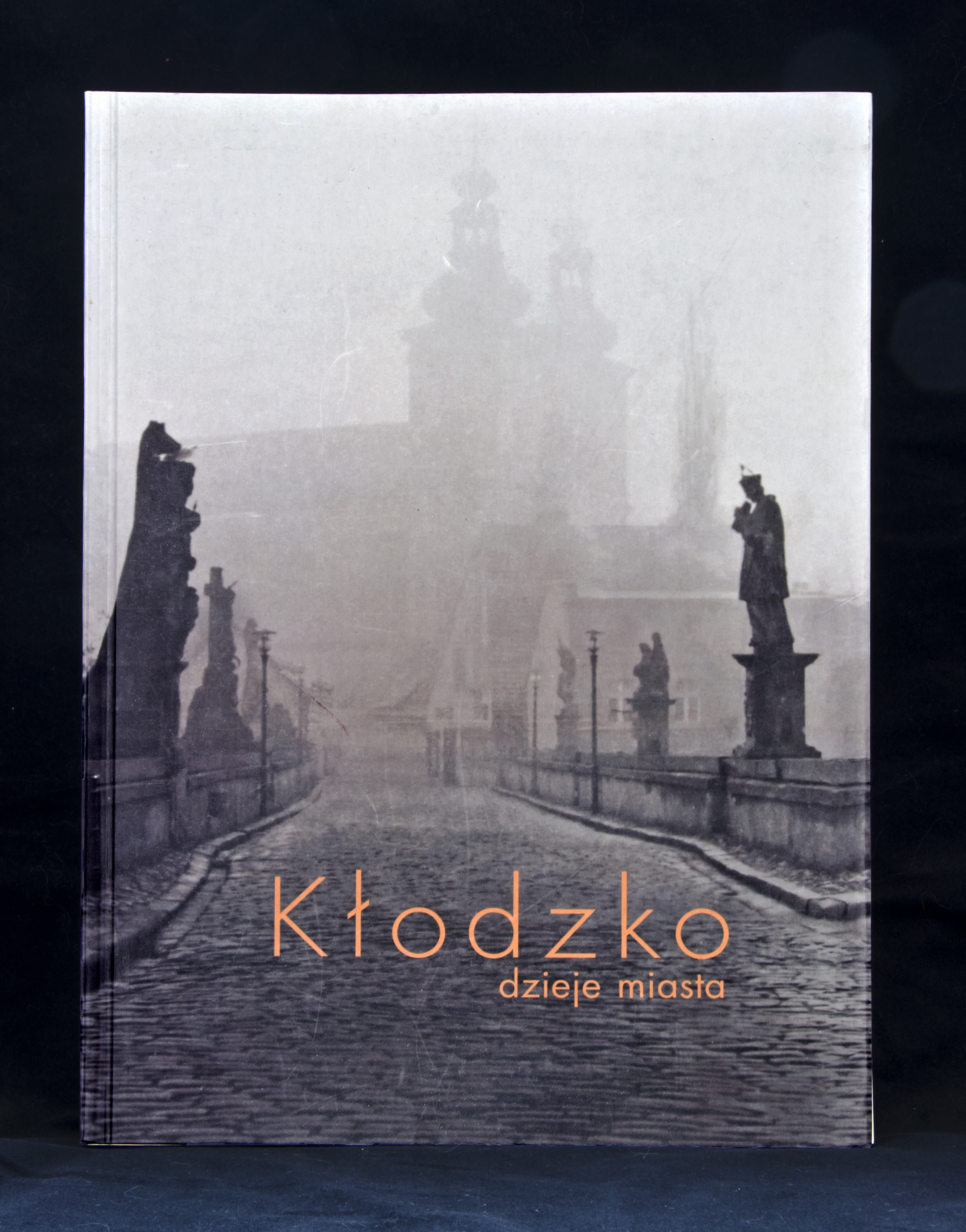 Monografia "Kłodzko, dzieje miasta", wydana przez Muzeum Ziemi Kłodzkiej w Kłodzku.